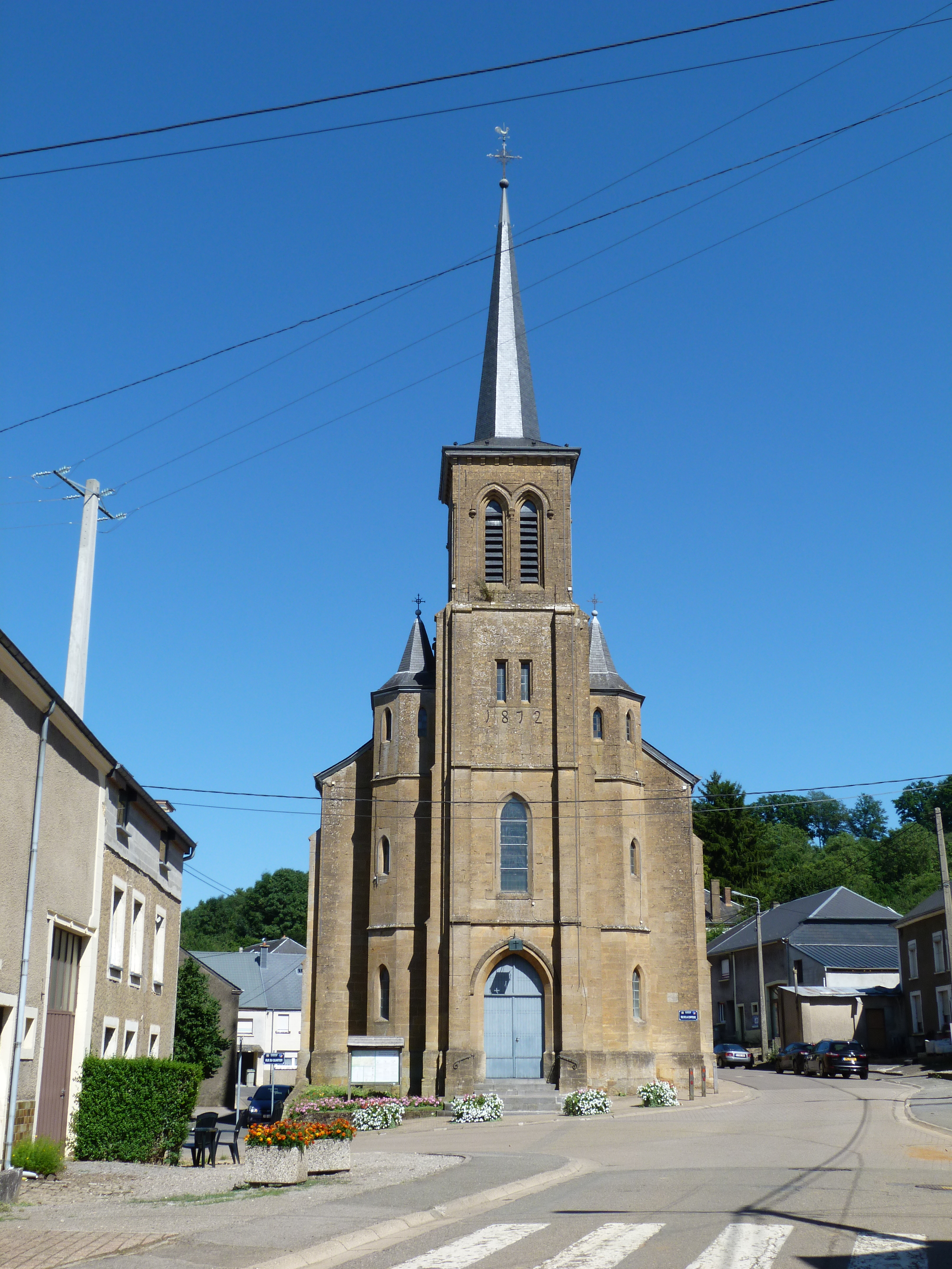 L'église de Battincourt en août 2013.